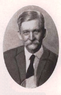 Ambrus Zoltán magyar író, kritikus, műfordító, a Magyar Tudományos Akadémia levelező tagja.